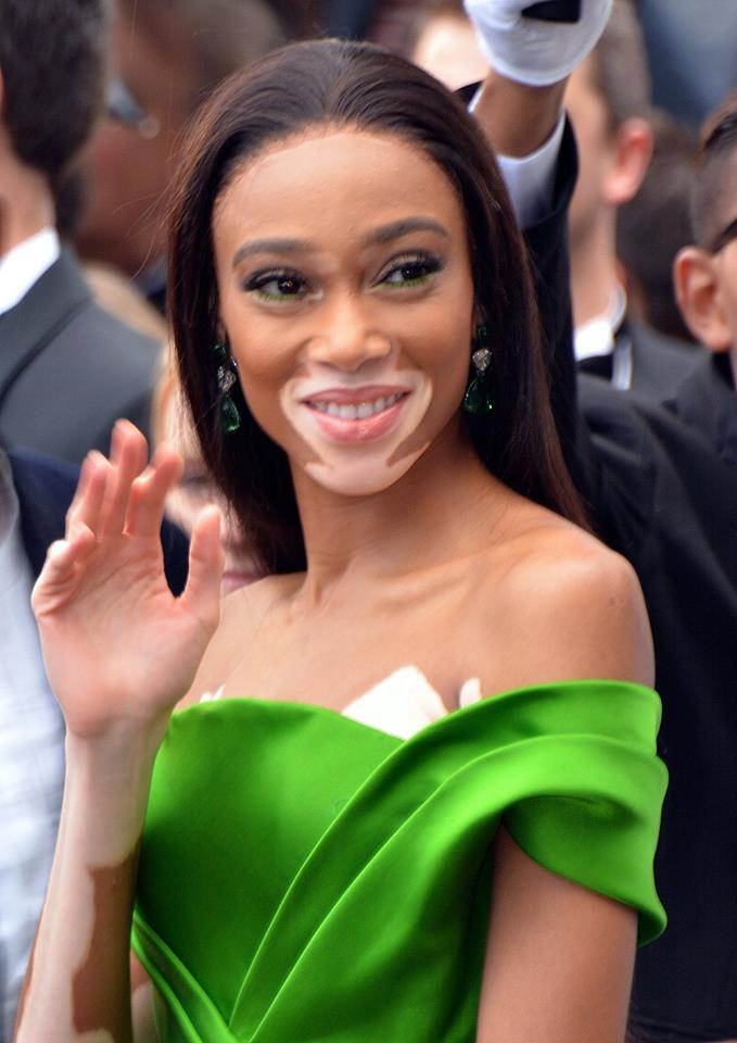 Winnie Harlow au festival de Cannes